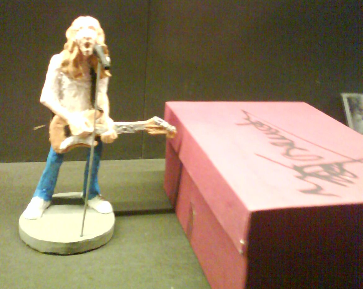 Figura de Rosendo en el museu del rock de Barcelona, junto a su caja.